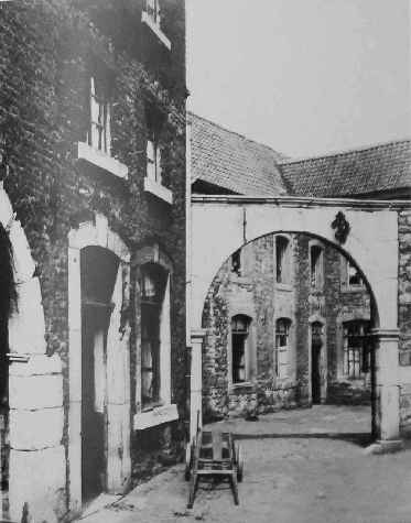 Wuppermanns Hof vor 1900; alte Krautlade